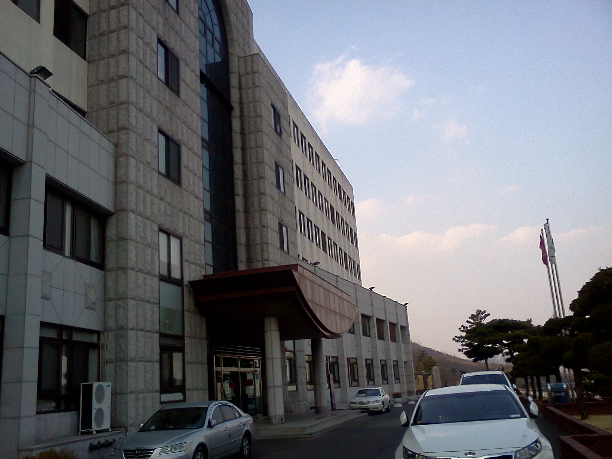 영산대학교 성심관